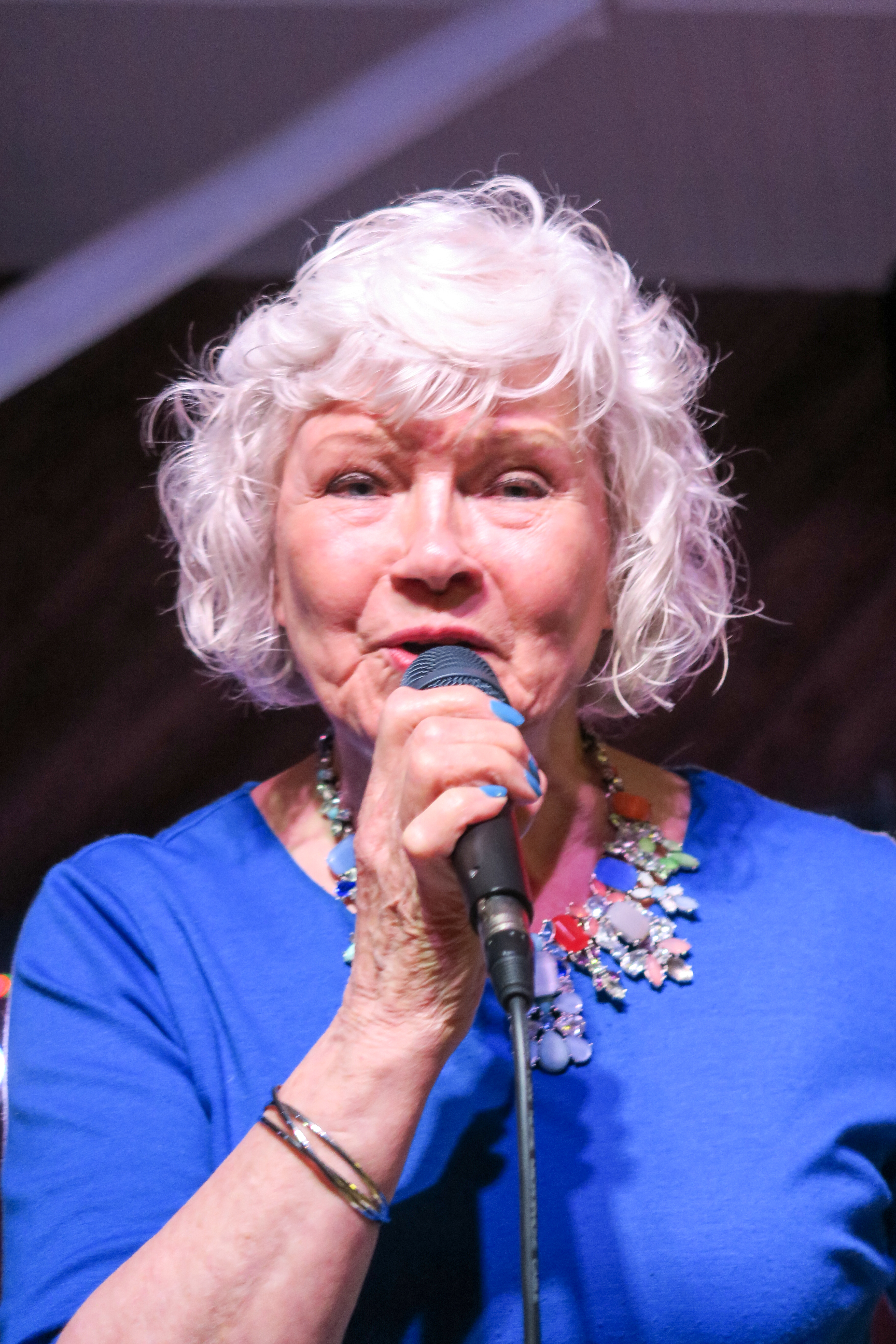 Vieno Kekkonen suomalainen laulaja